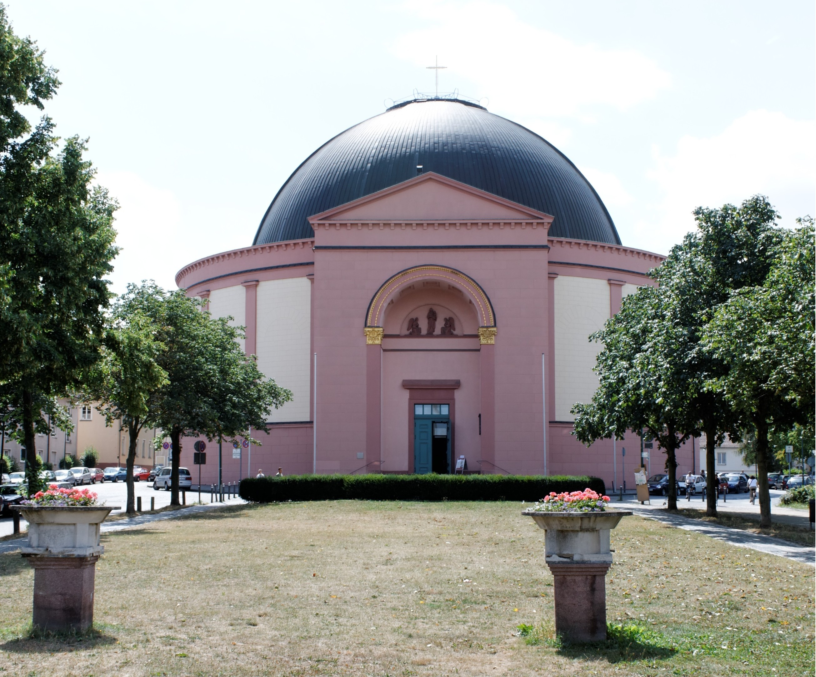 Darmstadt, kath. Kirche St. Ludwig